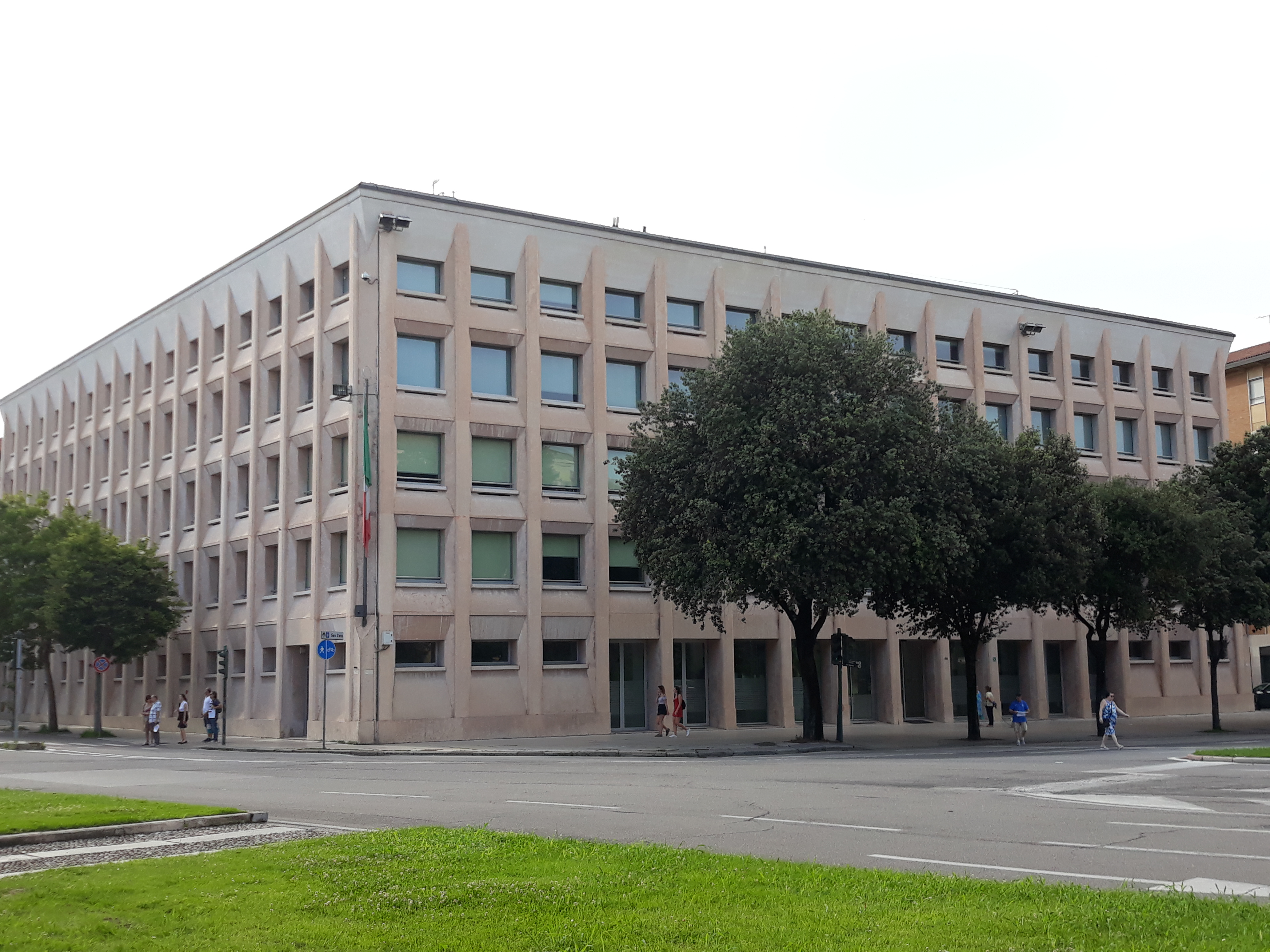 Palazzo che ospita la sede della Camera di commercio di Verona in corso Porta Nuova